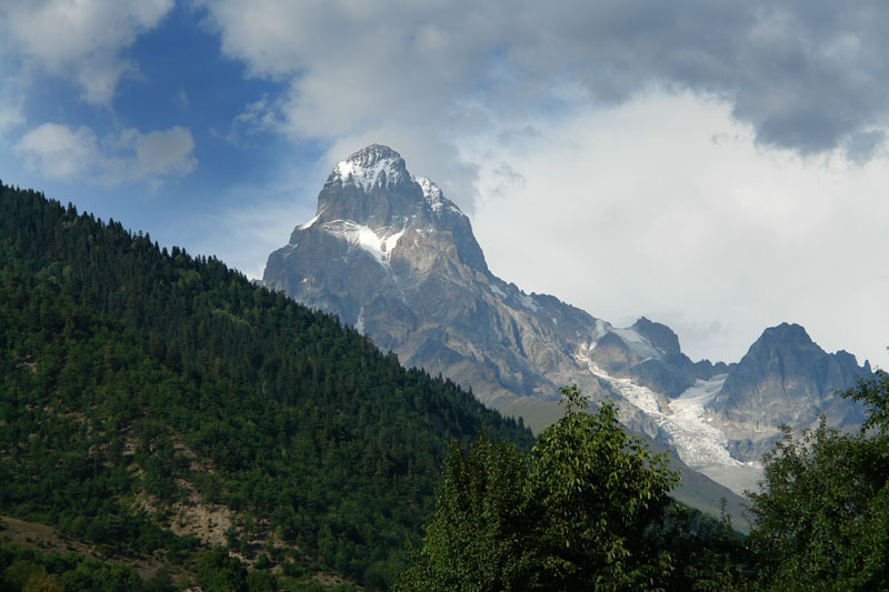 Ushba